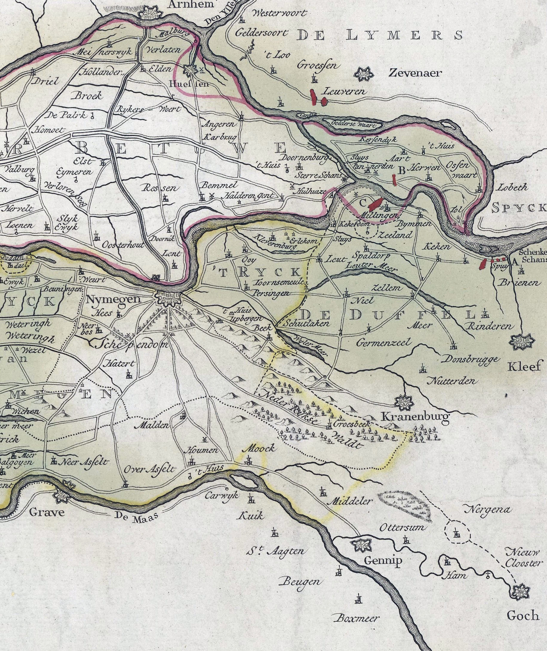 Detail uit de Kaart van het kwartier van Nijmegen en enige omliggende districten met de doorbraken van de rivierdijken van de rivieren de Rijn, de Waal en de Maas in de maand februari 1757 voorgevallen en enige indundaties